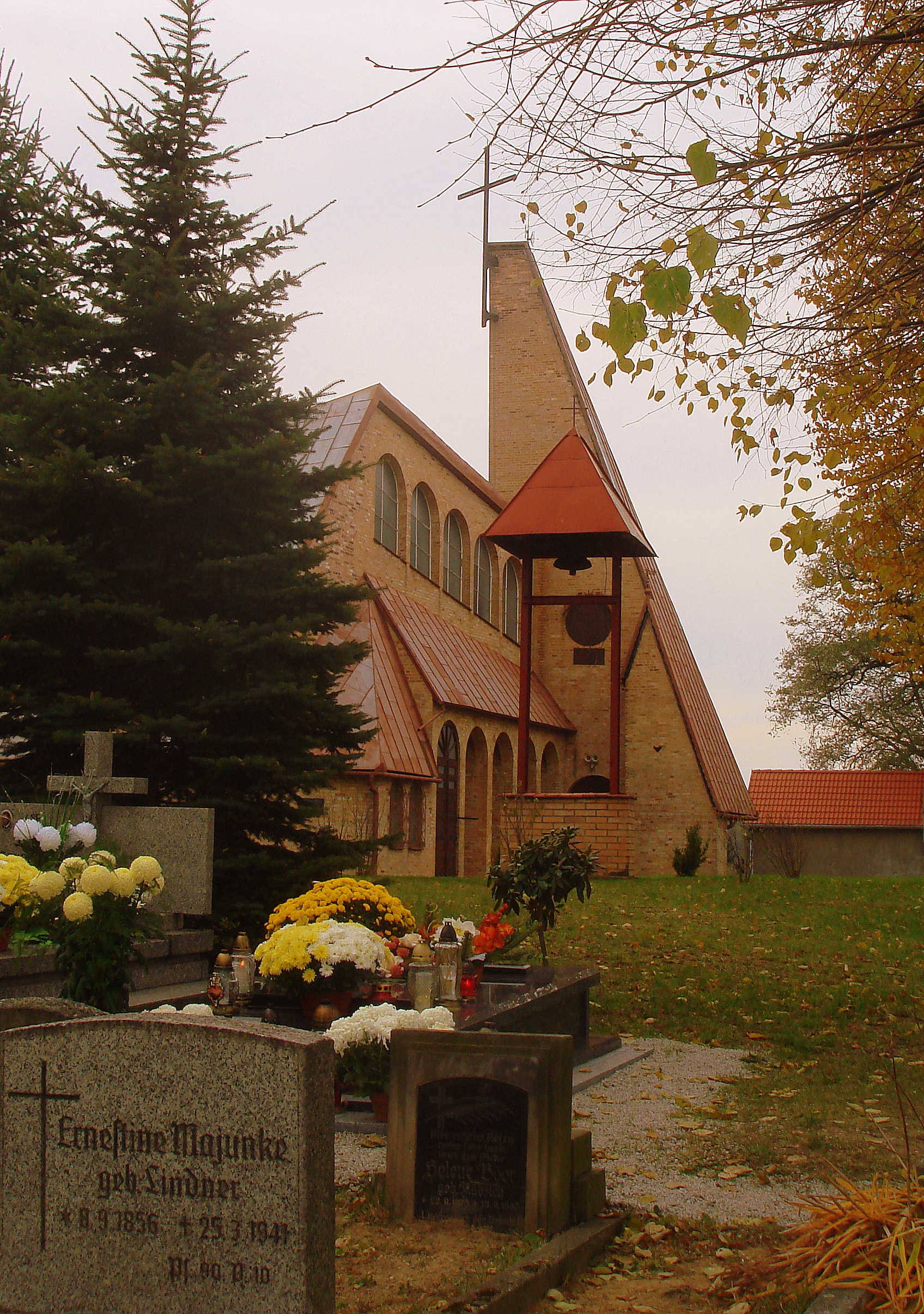 Pasieczna, cmentarz, kościół filialny pw. Matki Bożej Królowej Polski - 1 XI 2010 r.